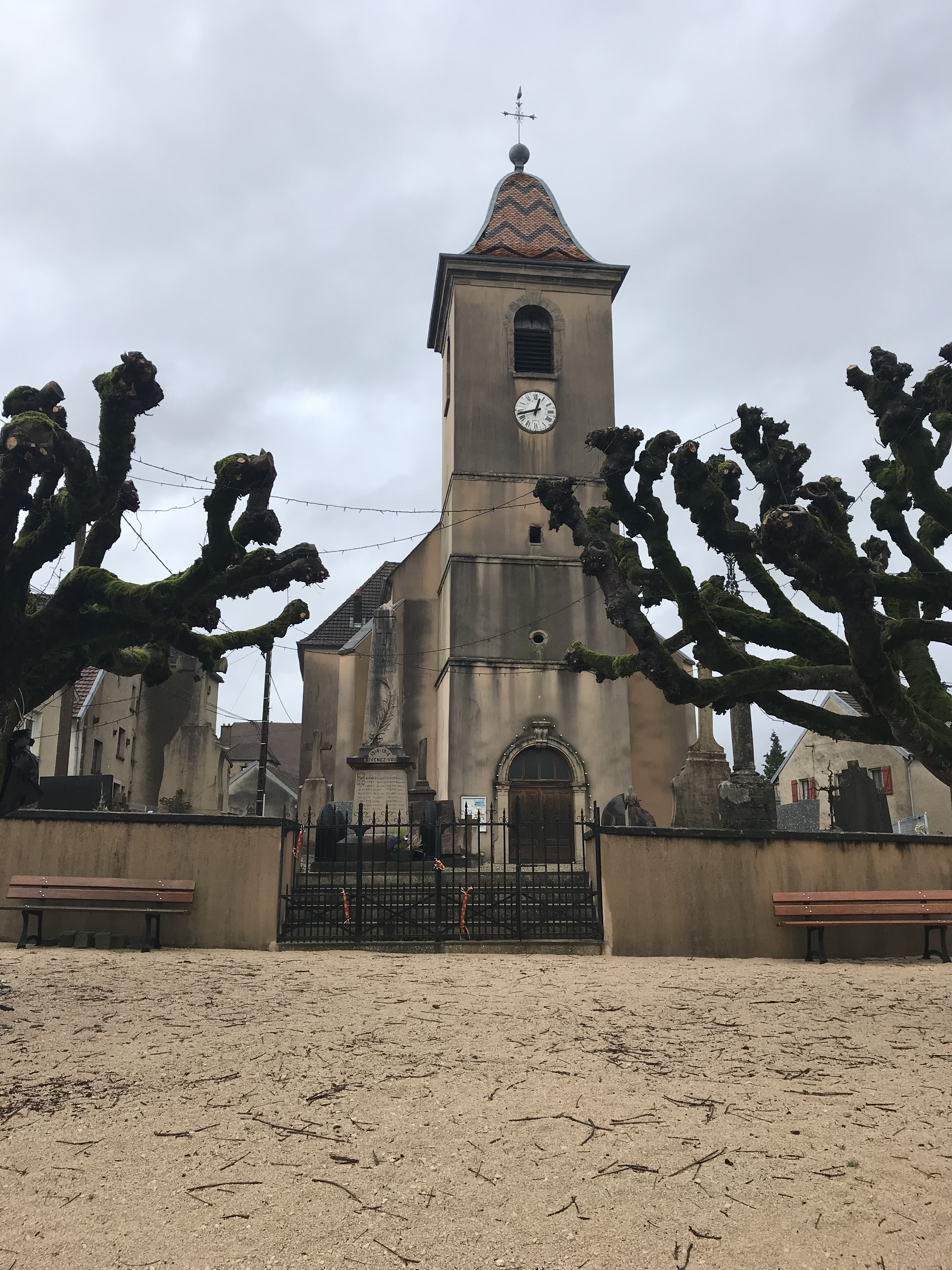 Vriange (Jura) en janvier 2018.